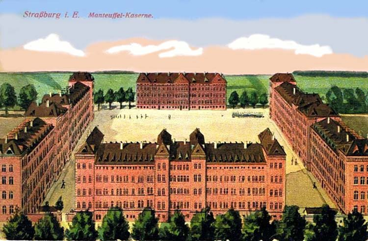 Manteuffel-Kaserne in Straßburg